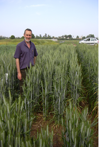 PLANTACIÓN DE TRIORDEO